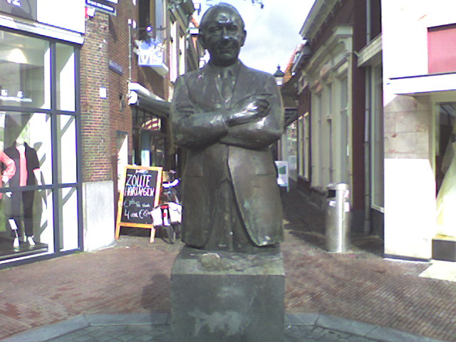 Beeld van Anne Vondeling in Leeuwarden, eigen werk maart 2006 Statue of Anne Vondeling in Leeuwarden, own work march 2006